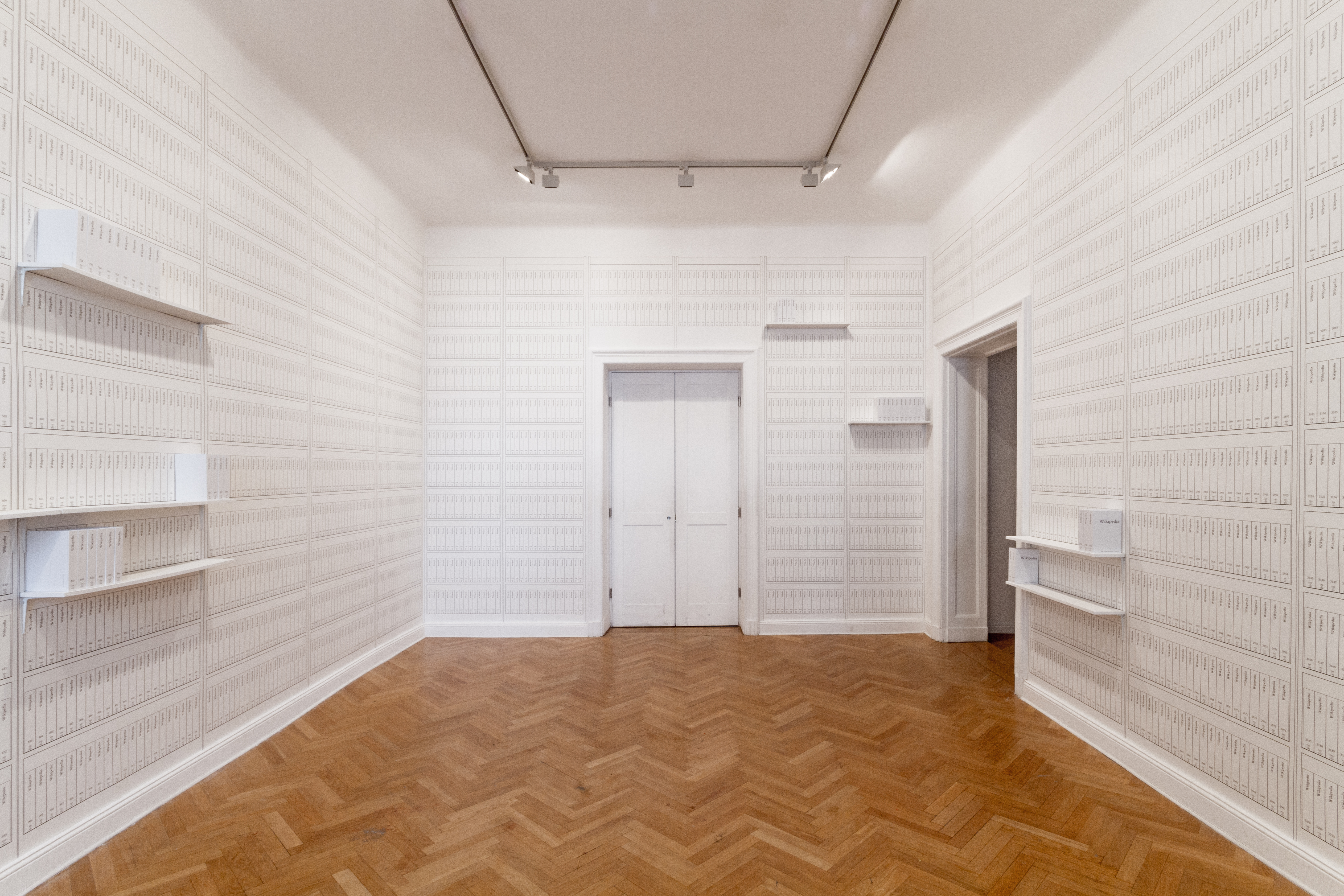 Ansicht der Ausstellung Print Wikipedia: from Aachen to Zylinderdruckpresse von Michael Mandiberg in der Gallerie Import Projects, Berlin